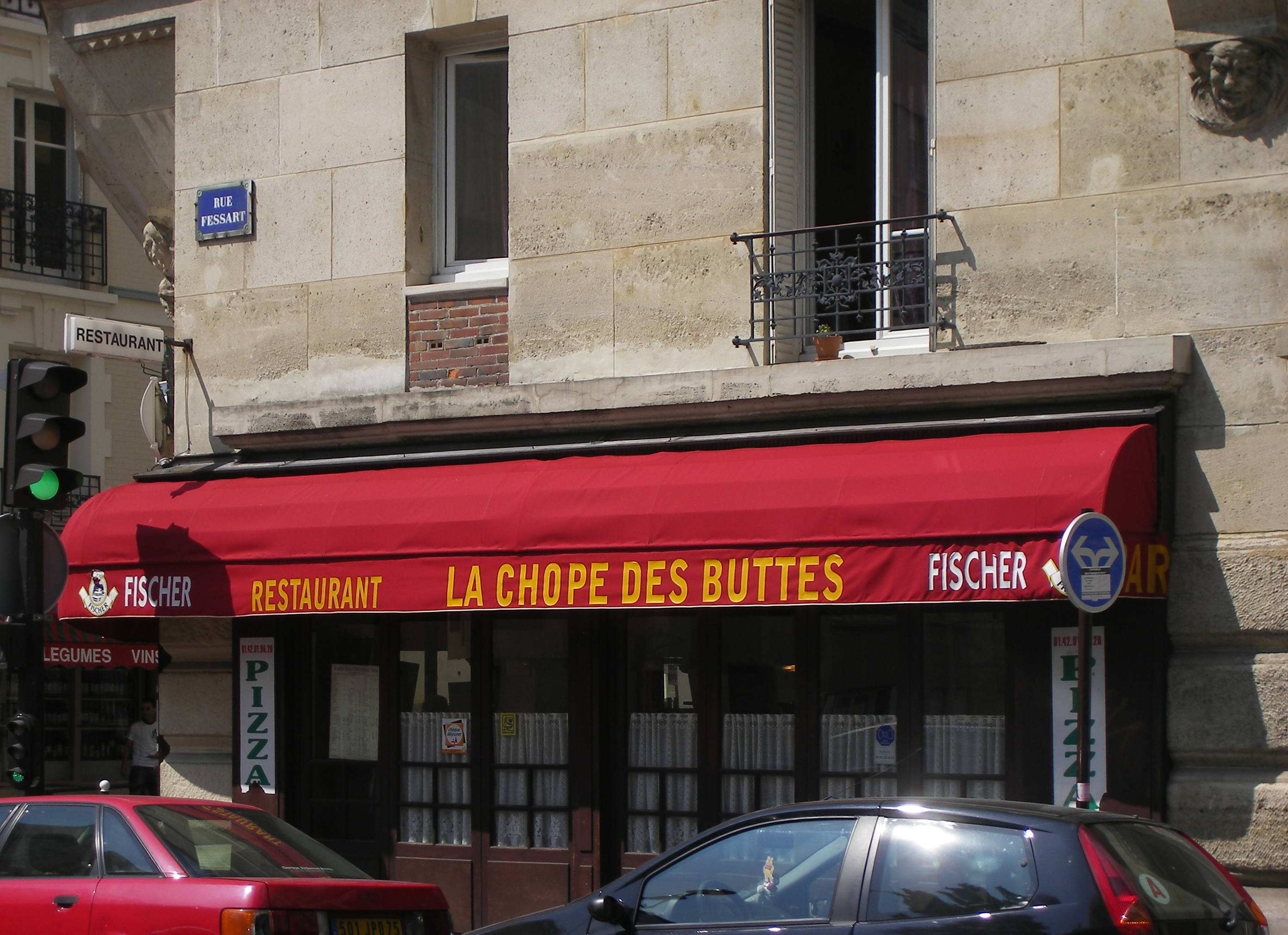 Un bar à Paris. Contrepet.